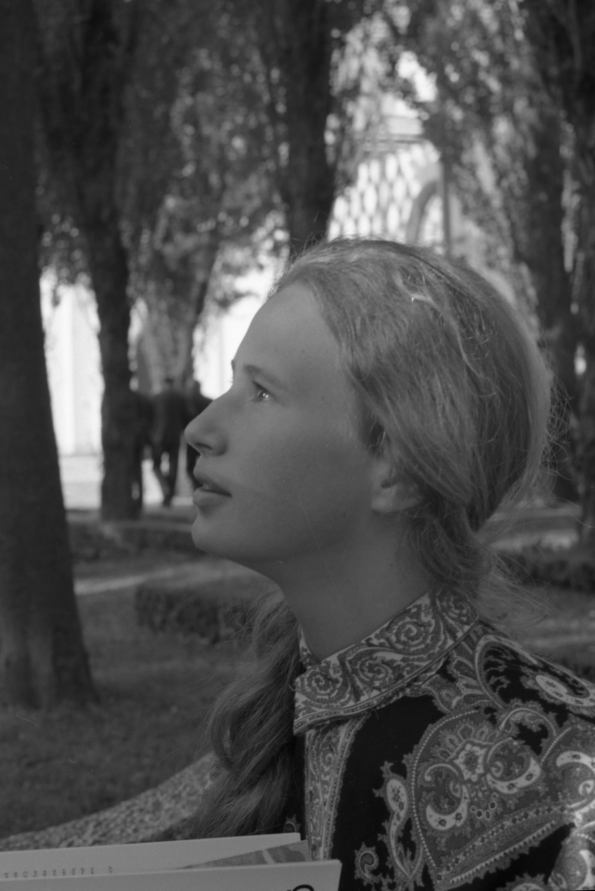 Servizio fotografico : Venezia, 1962 / Paolo Monti. - Strisce: 2, Fotogrammi complessivi: 12 : Negativo b/n, gelatina bromuro d'argento/ pellicola ; 35 mm. - ((I fotogrammi hanno una doppia numerazione. . - Sul portanegativi: Pentax FP3. - Sul dorso del portanegativi Monti specifica: "2/14 FP3; 20/37 Plus-X". - Occasione: Documentazione della Biennale di Venezia del 1962. - Fonte: Agenda di Paolo Monti: Foto Leica 1 / 1-51 verde, 1-110 nera (1958-1963), presso Archivio Paolo Monti